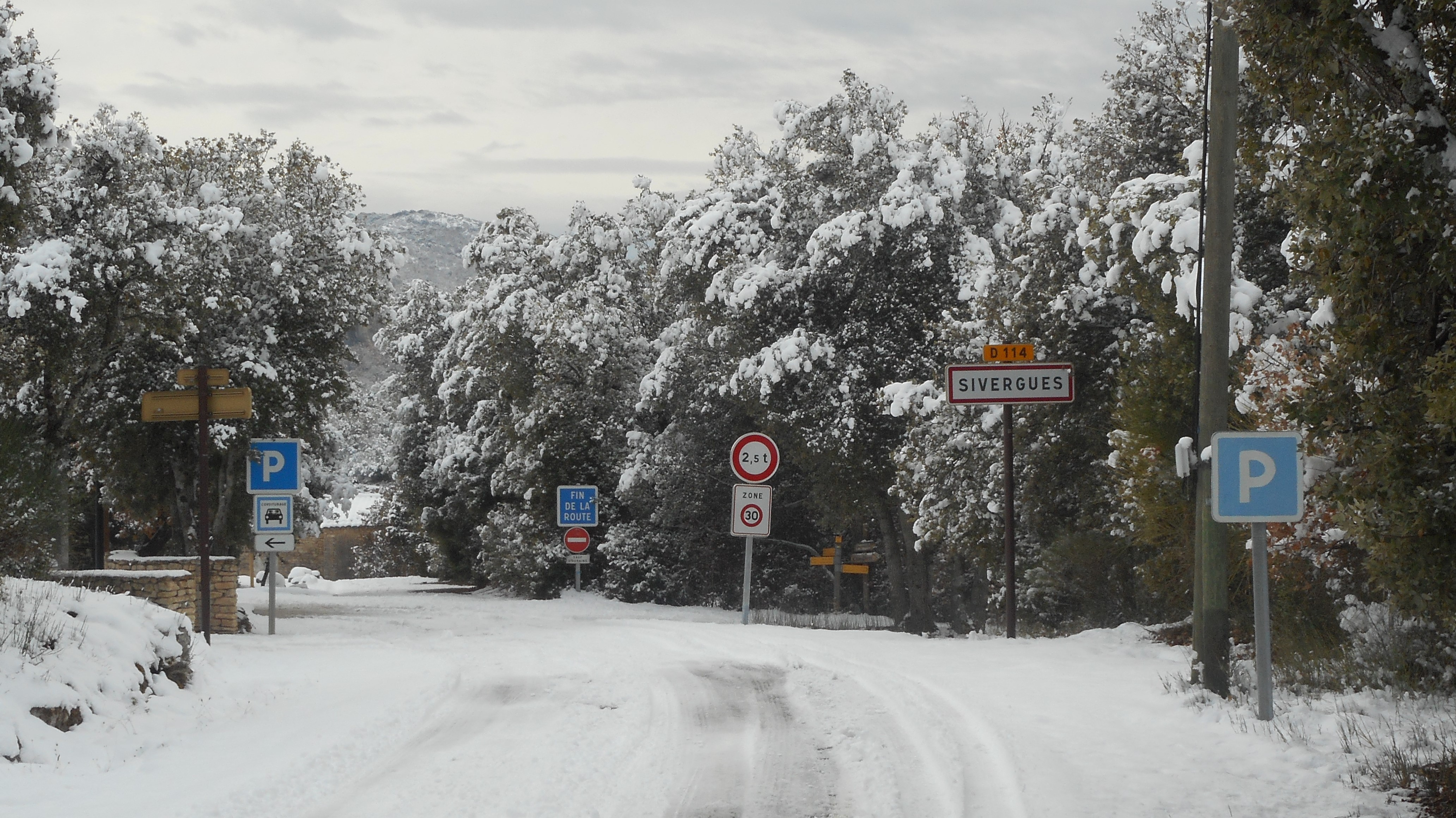 Entrée du village avec le fameux panneau Fin de la route un jour de neige en décembre 2017.